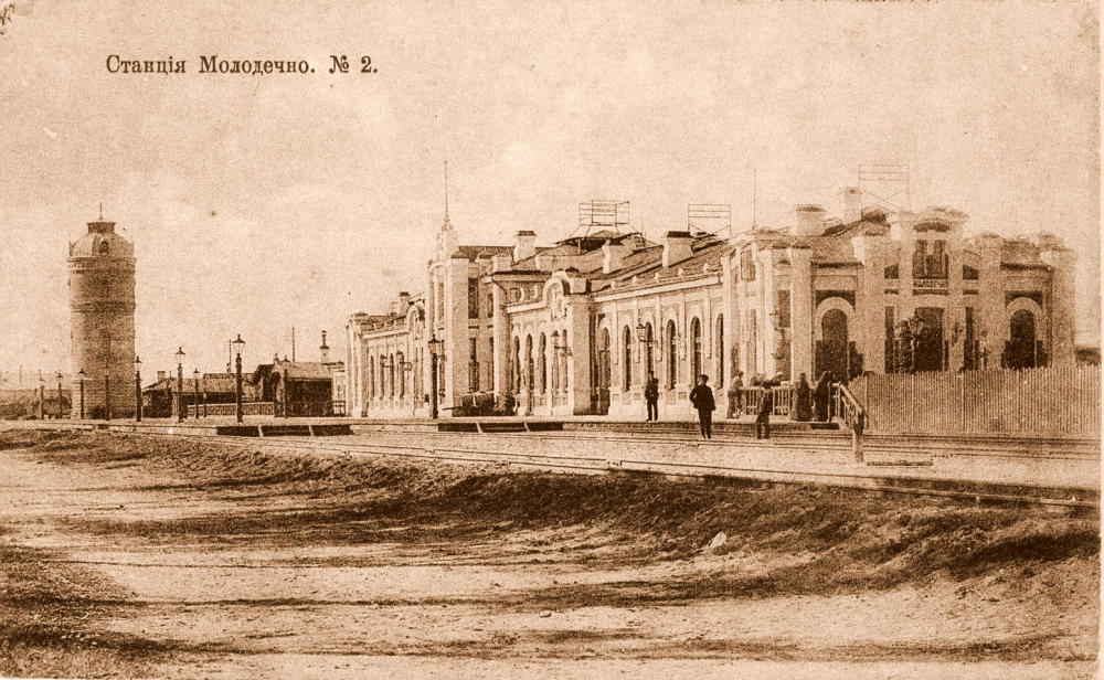 Чыгуначная станцыя ў Маладзечна